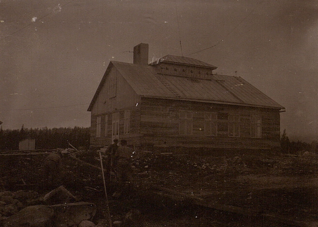 Hemsö, radiostationen Härnösand radio. Exteriör.